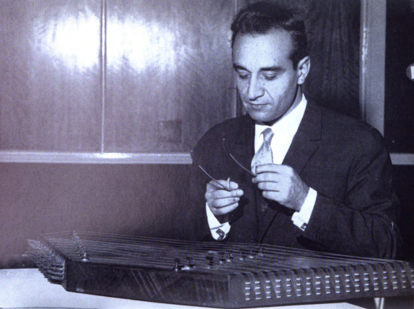 Faramarz Payvar playing santoor